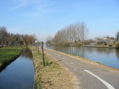 Jaagpad langs de Oude Rijn bij Nieuwebrug, februari 2003, eigen foto Categorie:Fietsinfrastructuur